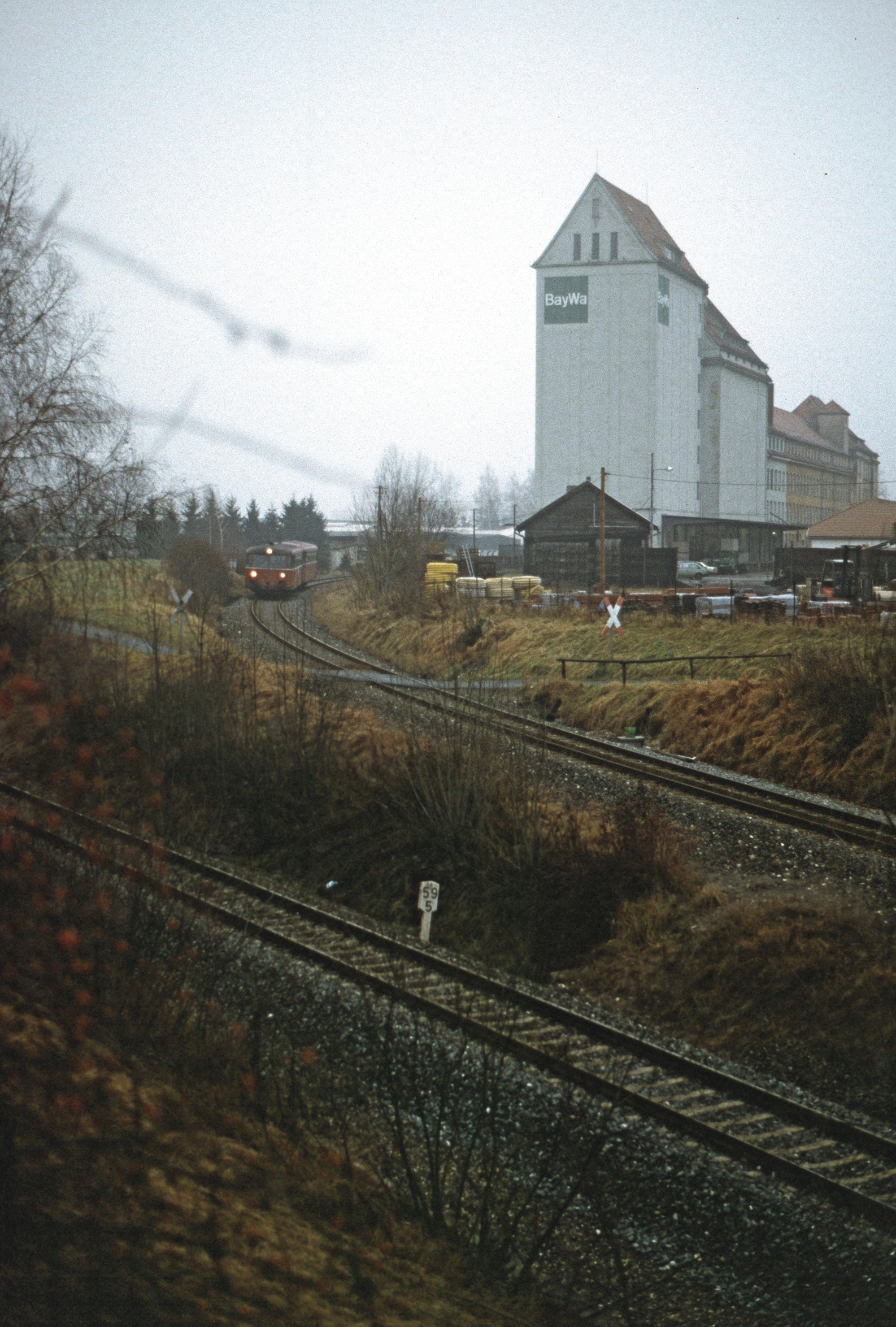 Bayreuth, Gleis nach Warmensteinach